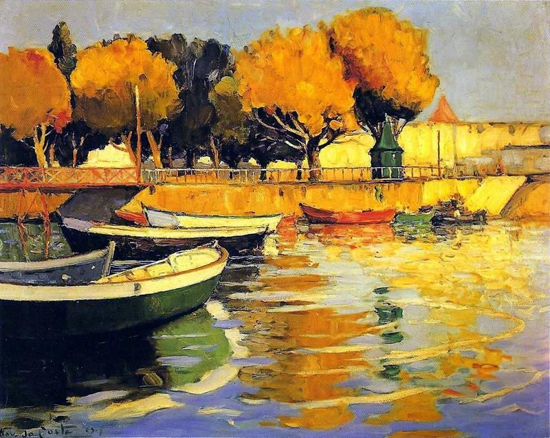 Porto de Leixões (óleo sobre tela, 81 x 100 cm)